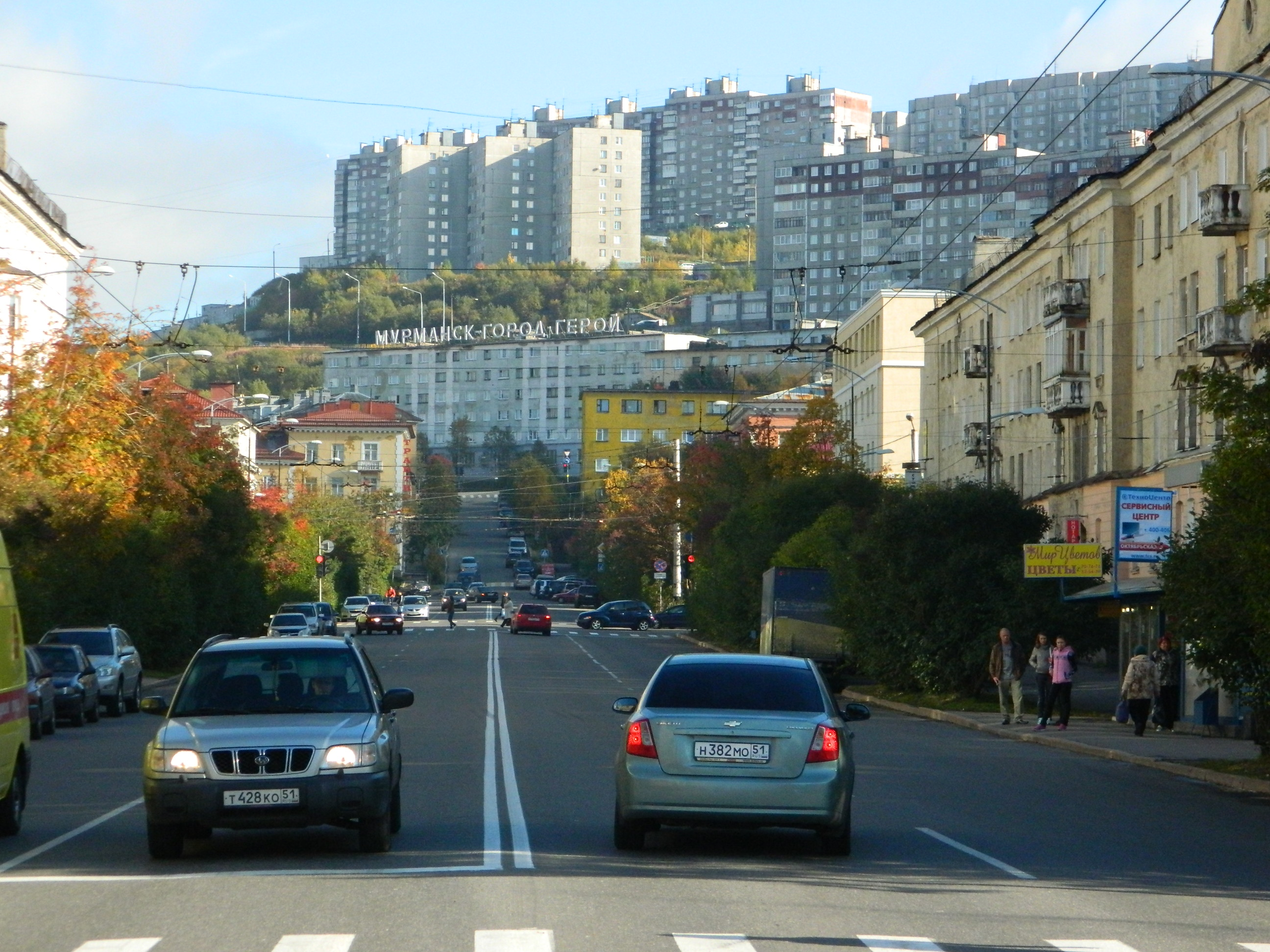 Мурманск. Проспект Ленина